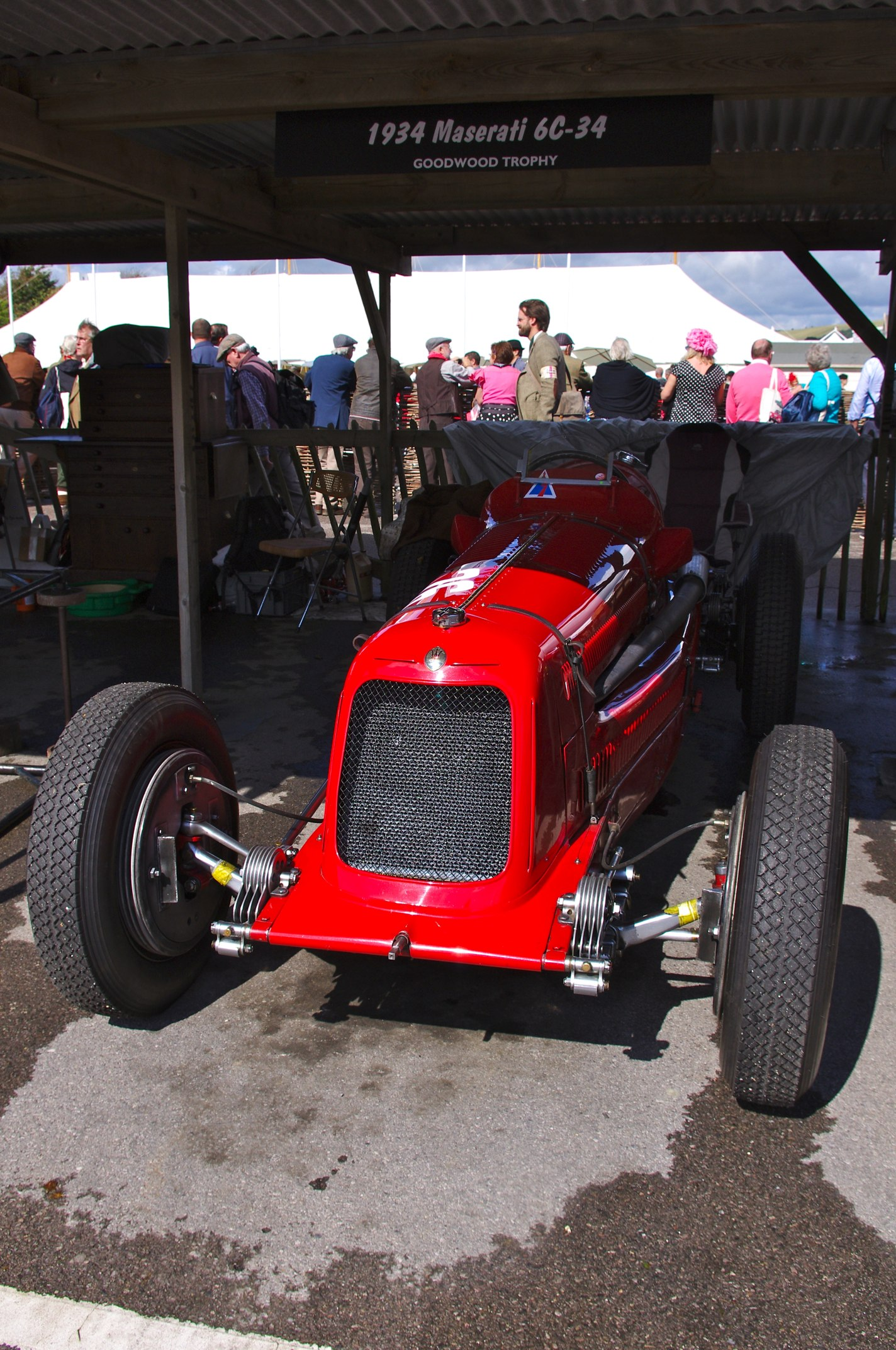 Goodwood Revival 2012